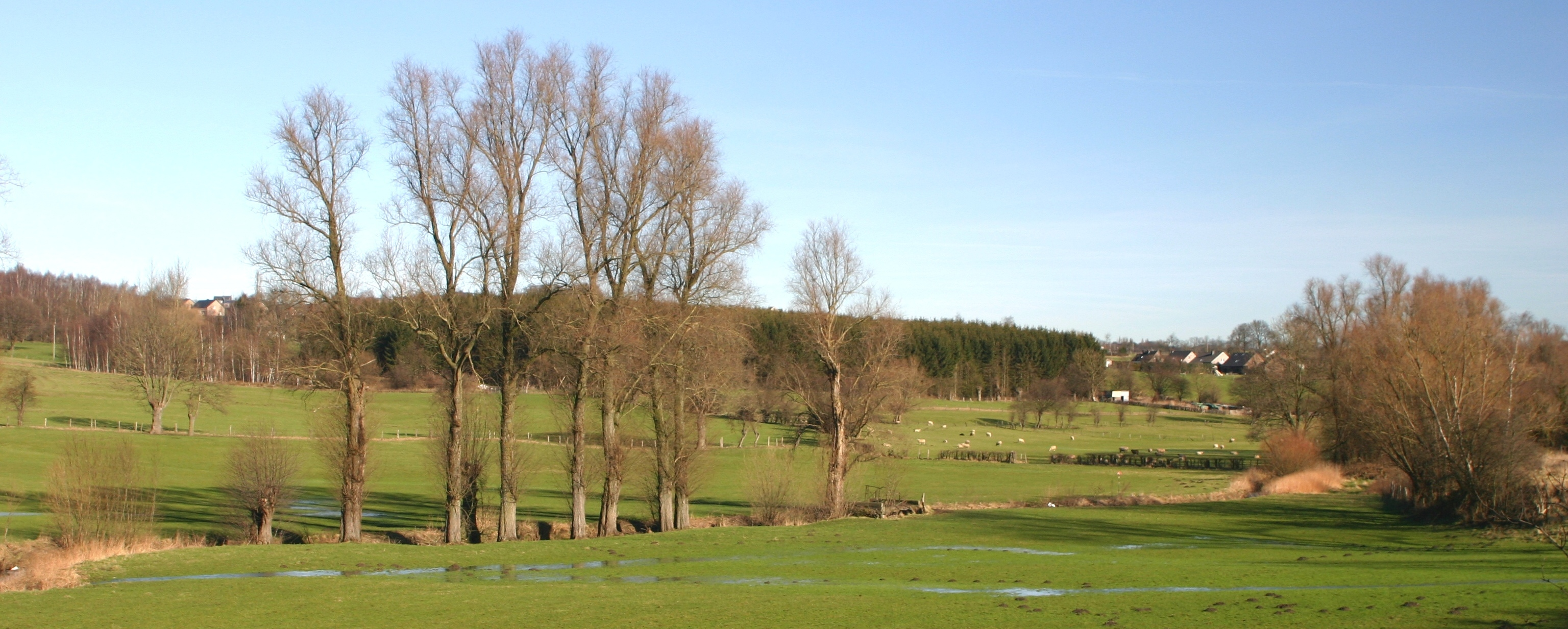 Den Dall vun der Magne am ieweschte Laf tëscht Soumagne an Xhenderesse laanscht d'Nationastrooss 621.